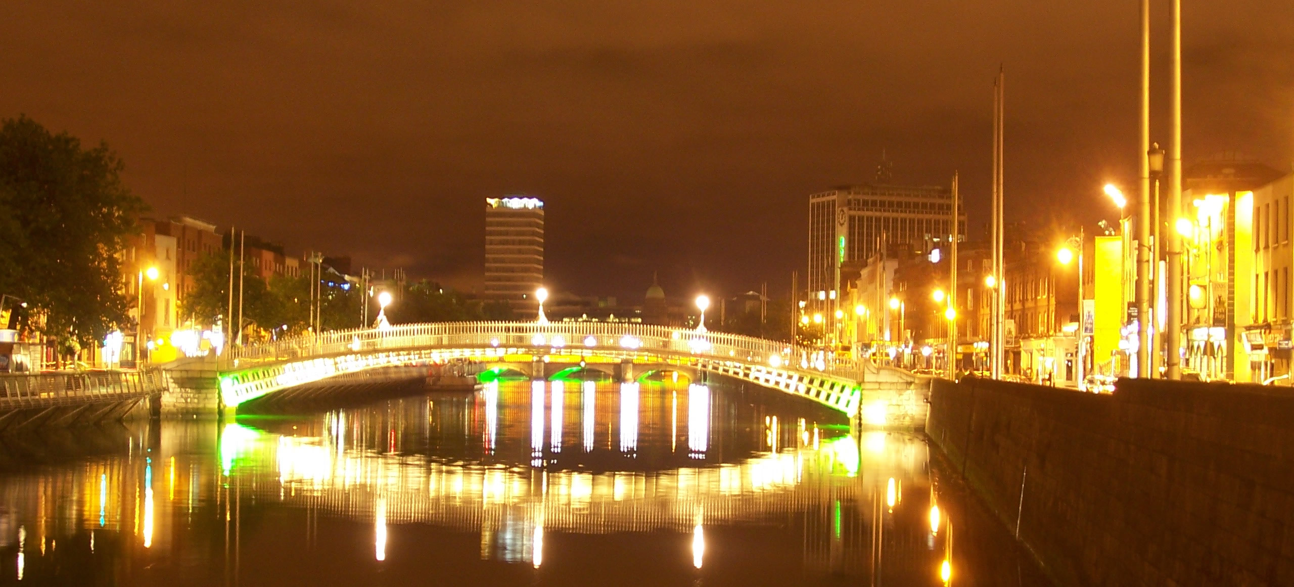 Half Penny Bridge at night / bei Nacht